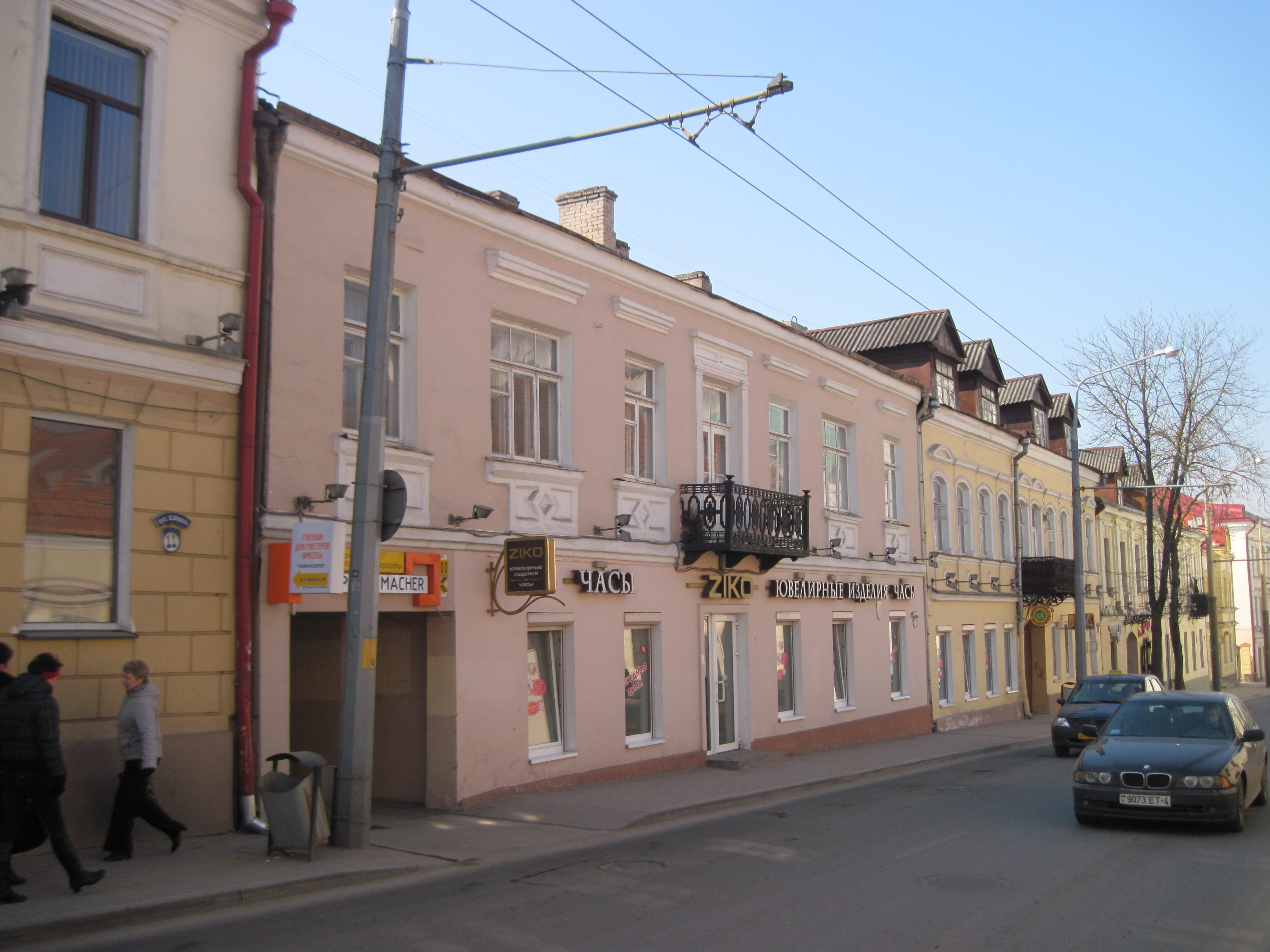 Забудова гістарычнага цэнтра Гродна. Вуліца К. Маркса, 9.